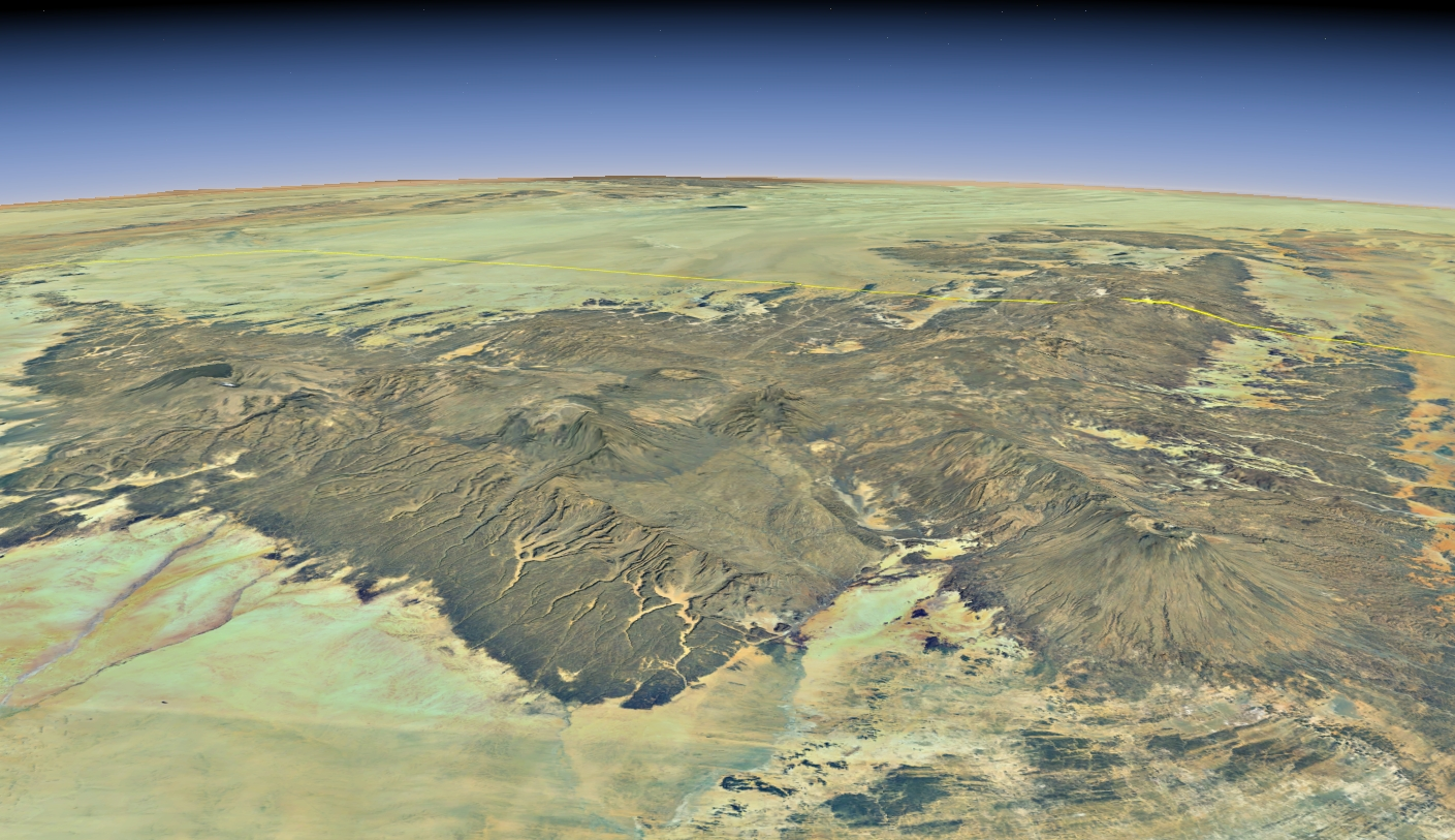 Massif du Tibesti, vu depuis le sud, avec une exagération du relief ; au premier plan à droite, l'Emi Koussi.